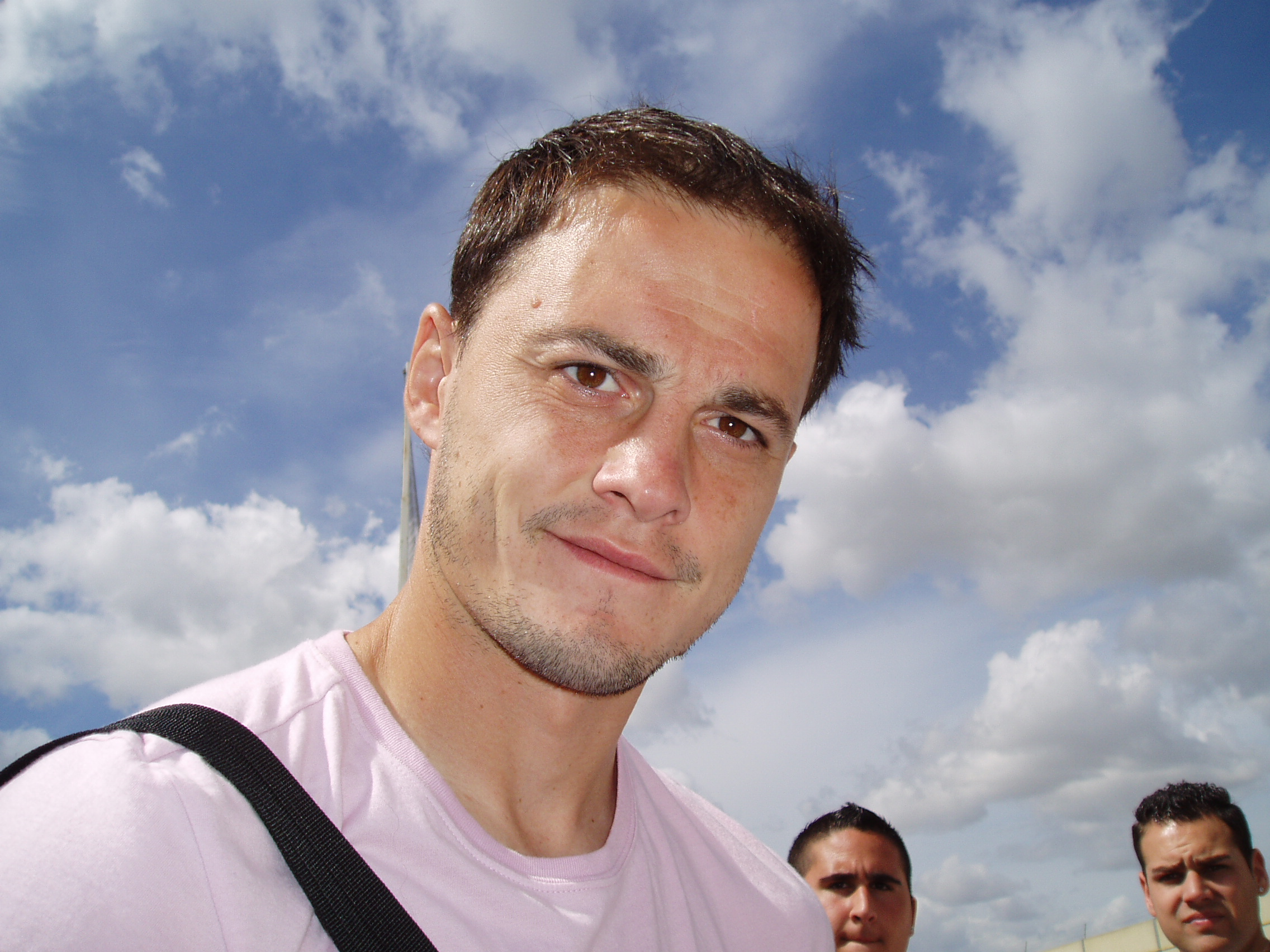 El jugador Victoriano Rivas Álvaro , "Nano", a la salida de los entrenamientos